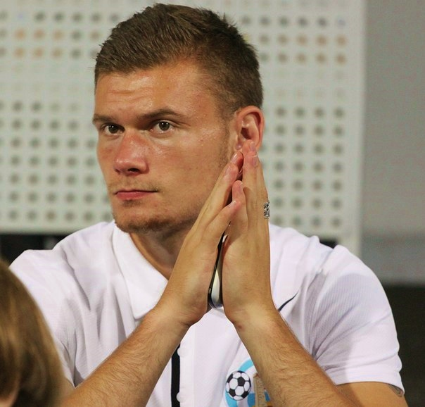 Prychynenko in 2013